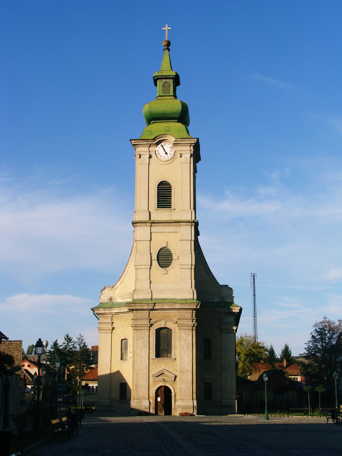 Római katolikus templom (Szob, Hámán Kató utca 3.)